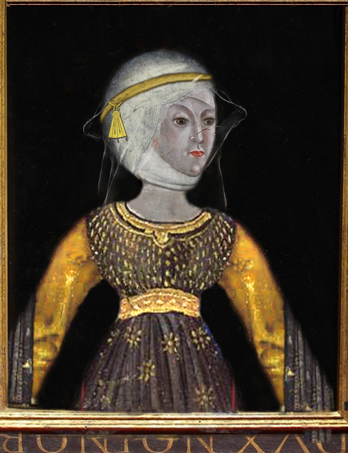 Портрет Изабеллы Кастильской, герцогини Йоркской (1355 / 1356 — 23 декабря 1392), супруги Эдмунда Лэнгли, первого герцога Йоркского. (Portrait Isabella of Castile, Duchess of York (1355/1356 23 December 1392), wife of Edmund Langley, 1st Duke of York.)